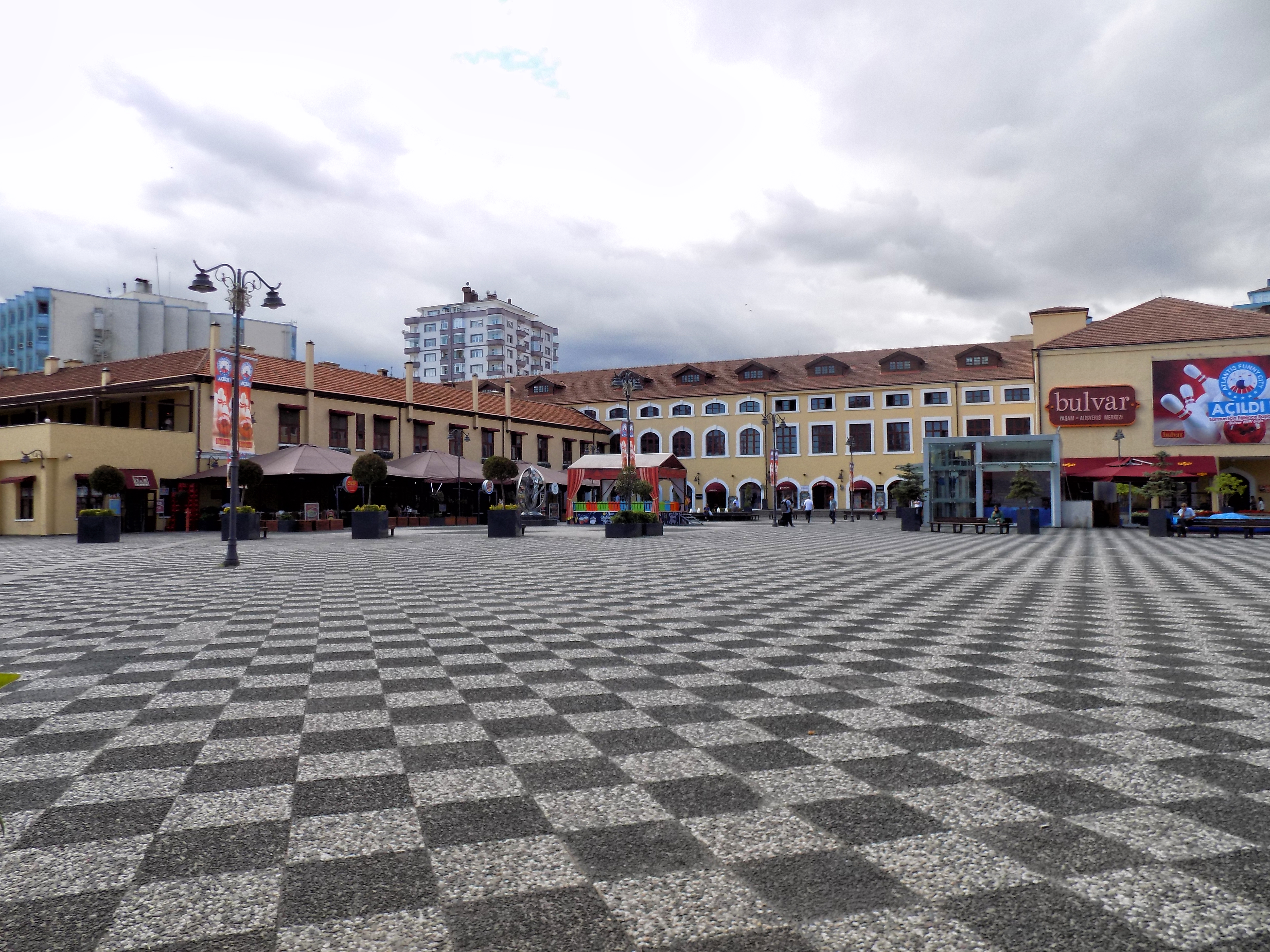 Samsun'un İlkadım ilçesinden yer alan Bulvar AVM'den bir görünüm.